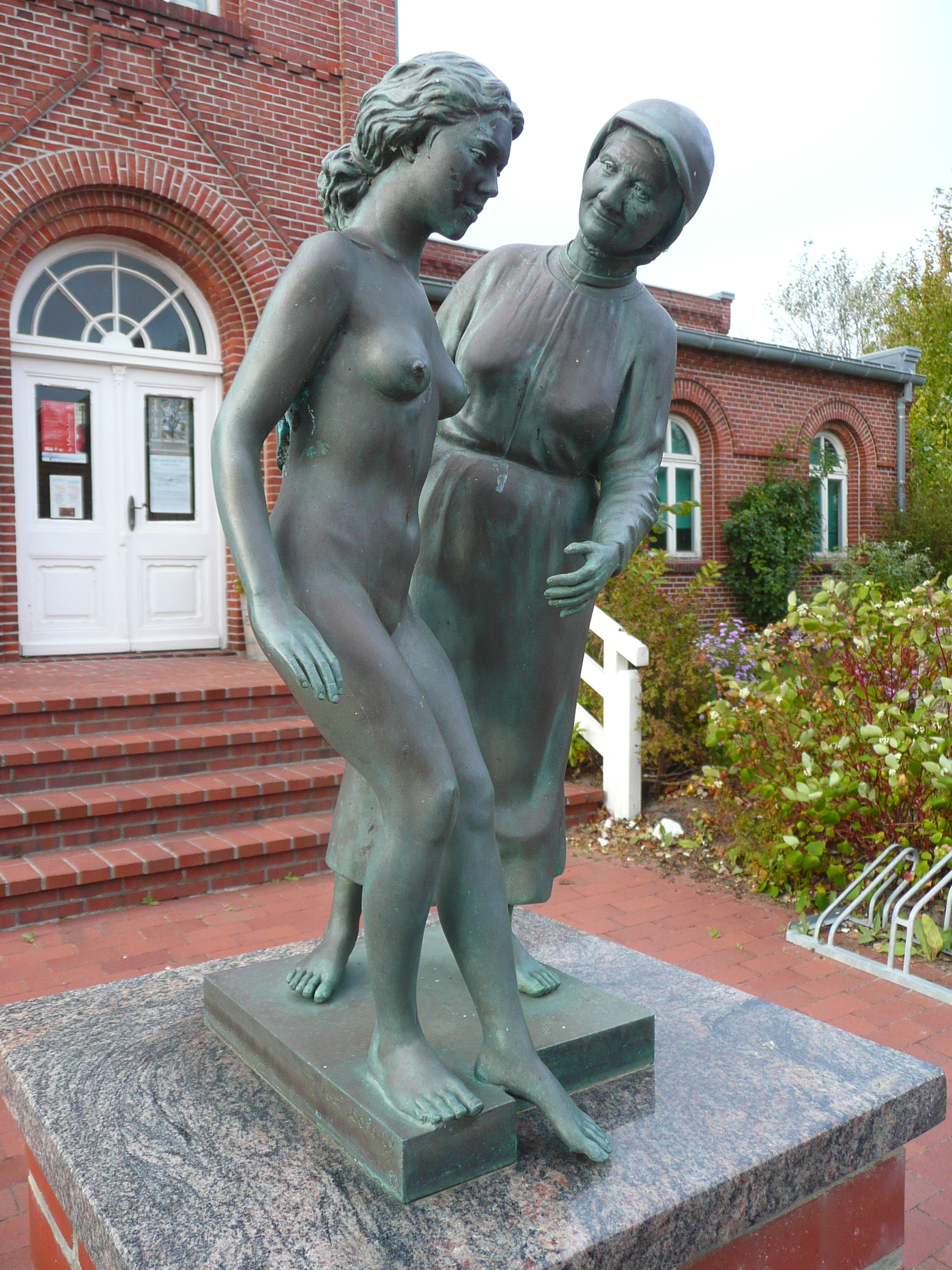 Skulptur "Badefrau" von Karl Ludwig Böke zur Erinnerung an die alte Juister Badetradition, aufgestellt vor dem alten Warmbad auf der ostfriesischen Nordseeinsel Juist (Niedersachsen, Deutschland); Nachtrag: diese Skulptur scheint seit 2013 Geschichte. Siehe dazu und das Fotos File:Juist, Altes Warmbad -- 2014 -- 3632.jpg von 2014